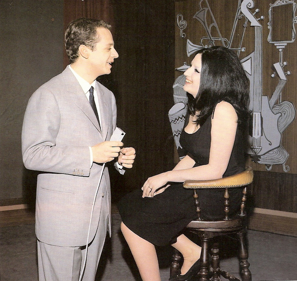 Foto tratta da una rivista del 1965